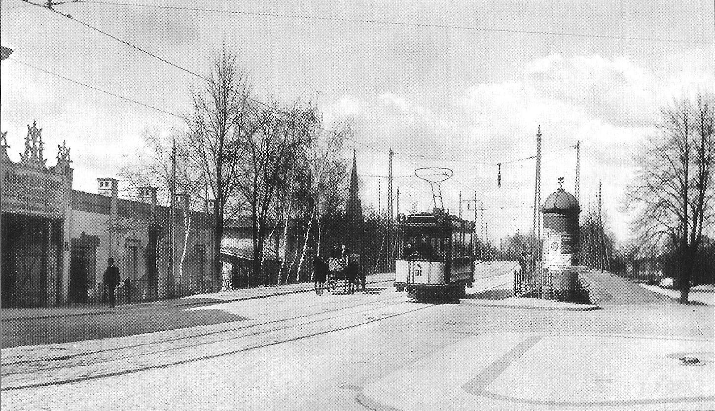 Wagen 31 der Städtischen Straßenbahn in der Schloßstraße (heute Alt-Köpenick) auf dem Weg zur Dammbrücke